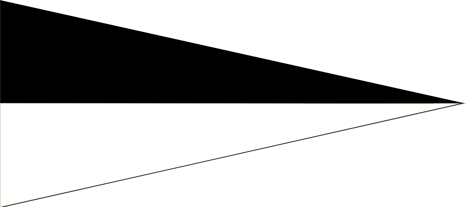 LWP proporczyk samodzielnego dywizjon umoździerzy